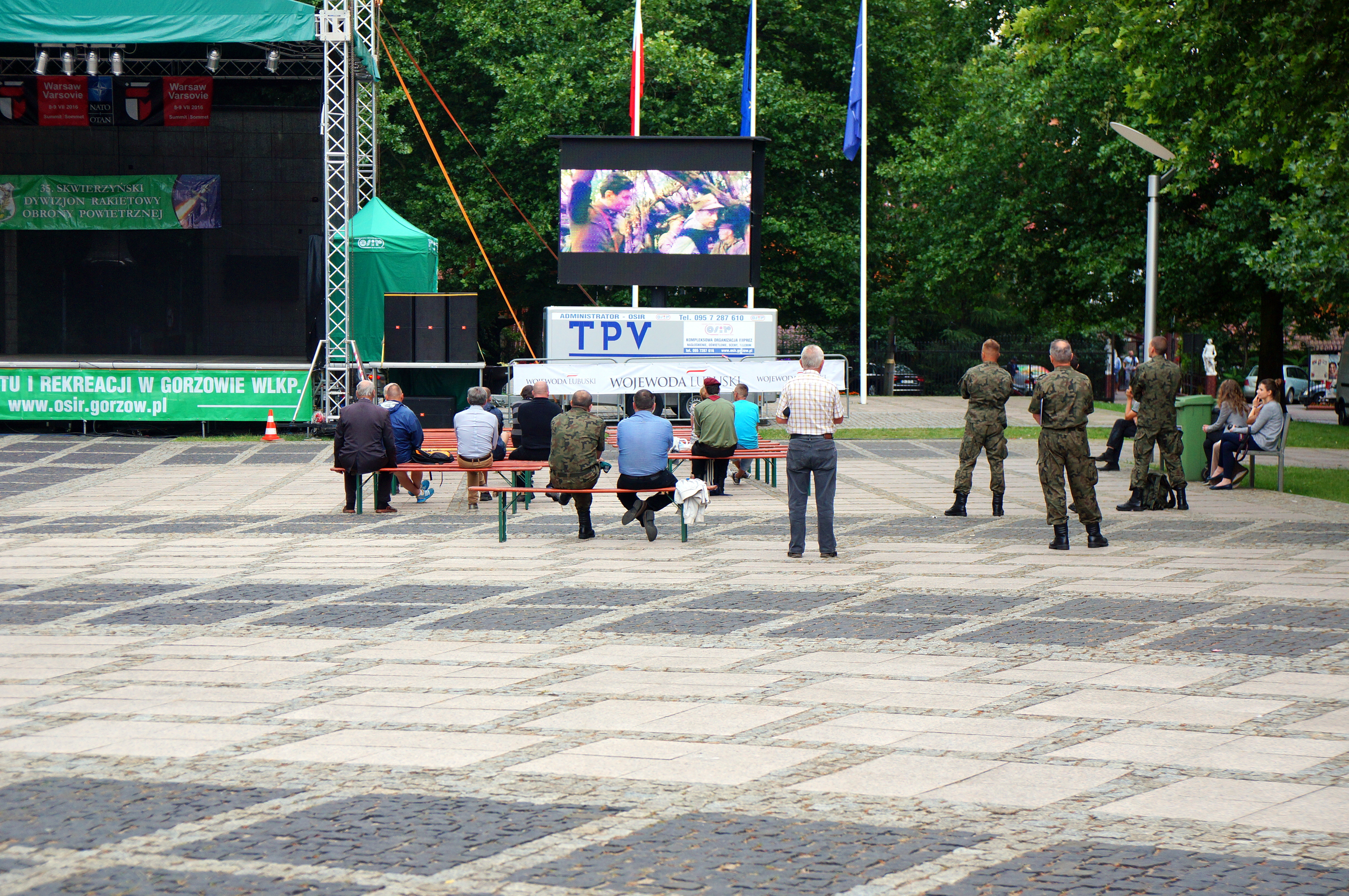 Plenerowa projekcja filmu "Historia Roja", jedną z atrakcji Ogólnopolskich Dni NATO w Gorzowie Wlkp.